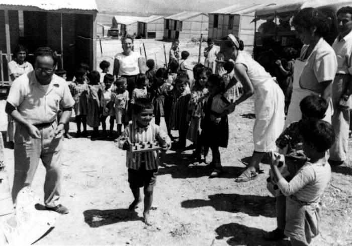 בשנות החמישים הוקמו מעברות לקליטת עליה.באזור שלנו הוקמה מעברת מנסי.